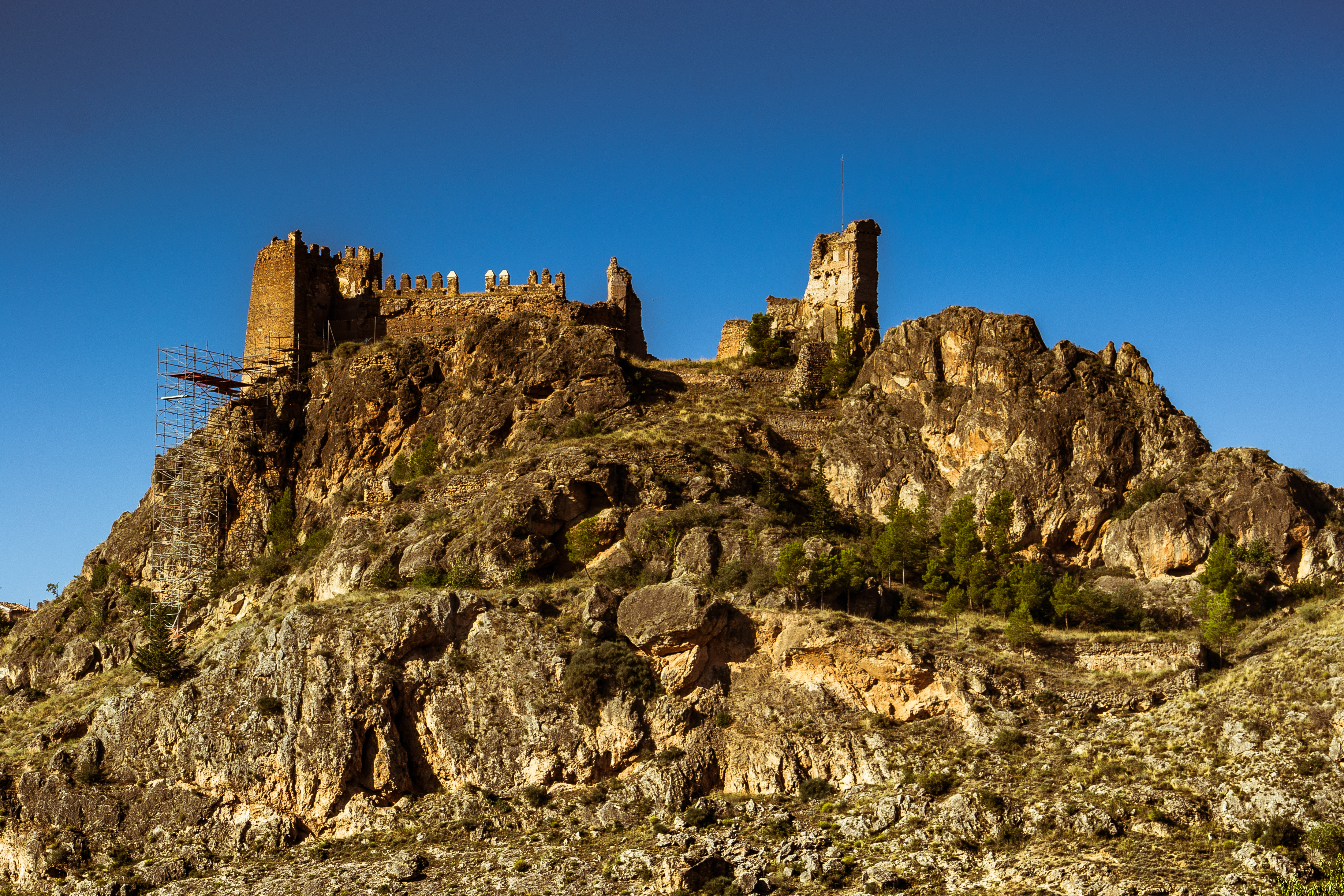 Vista del castillo árabe de Arándiga, tomada desde la carretera.